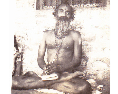 nadayogi veenamaharaj swami dattatreya rama rao parvatikar